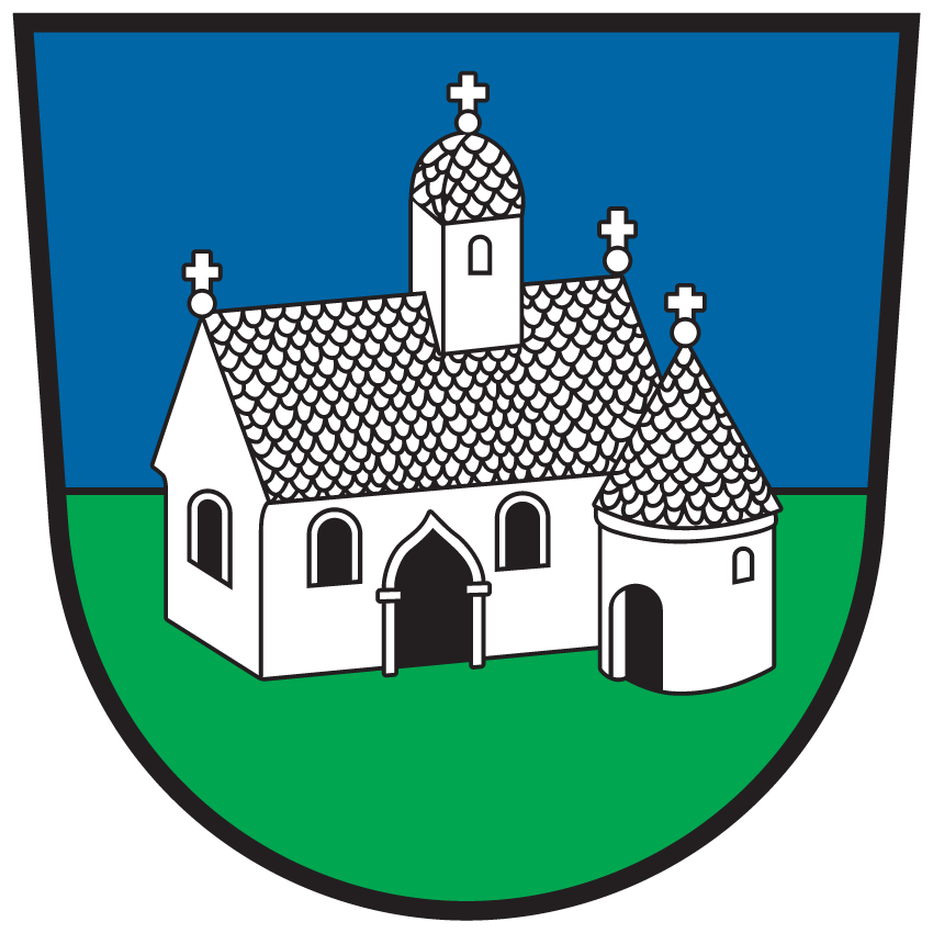 Wappen von Feldkirchen